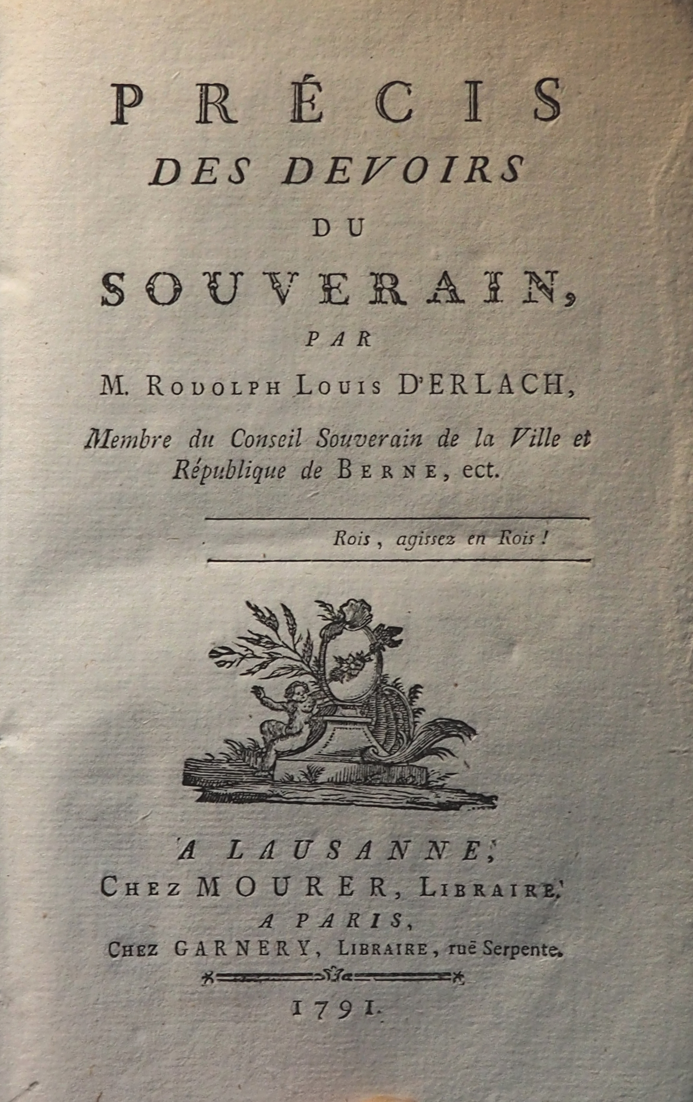 Rodolphe Louis d'Erlach, Précis des devoirs du souverain, 1791 (titre).